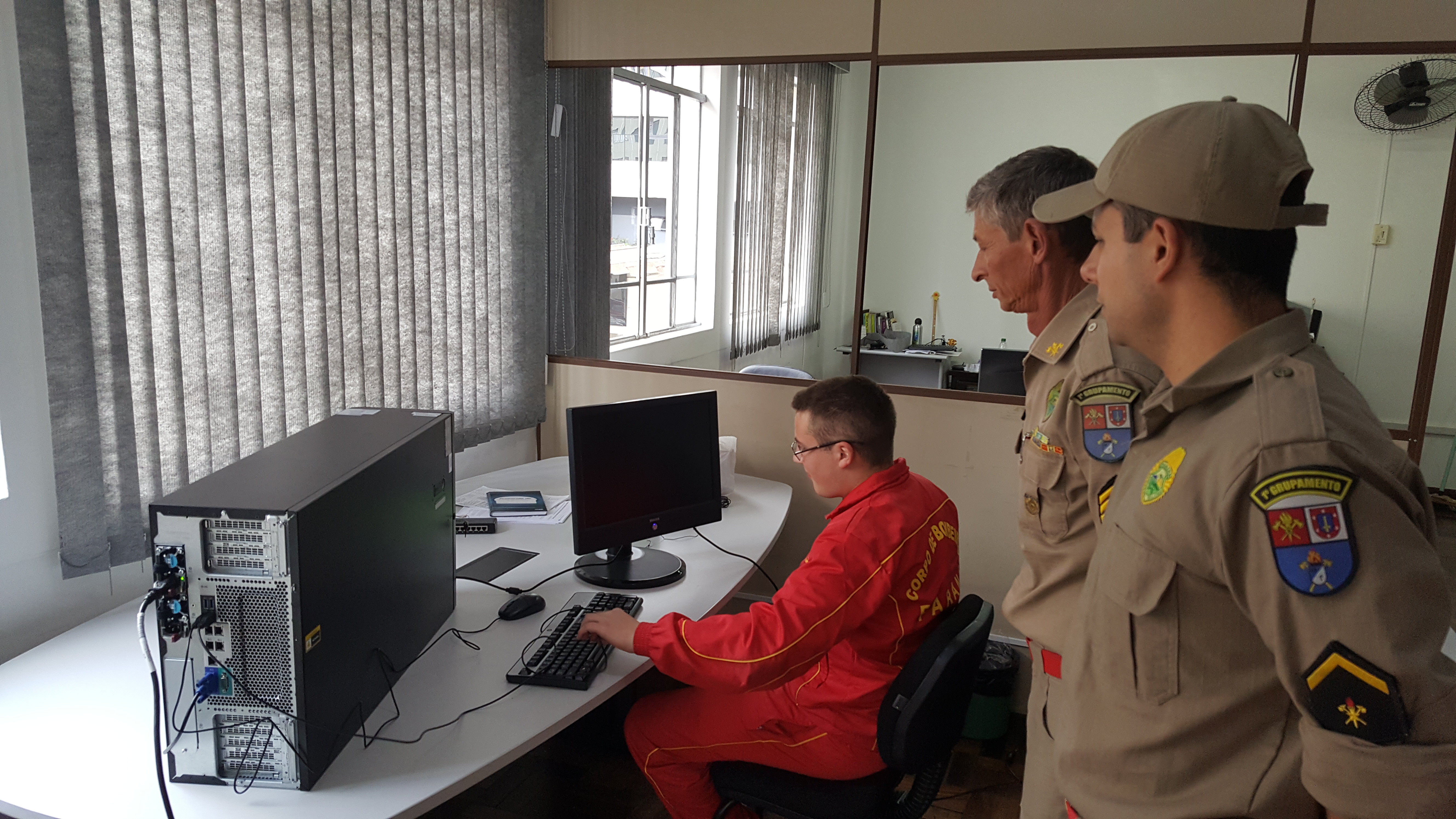 Entrega técnica de servidor de dados ao 1º GB. Sentado: o Sd. 2ª Classe Dallazuana. Em pé: os Gestores de Tecnologia da Informação do 1º Grupamento de Bombeiros, 1º Sargento QPM 2-0 Gerson e Sd. QPM 2-0 Nascimento.